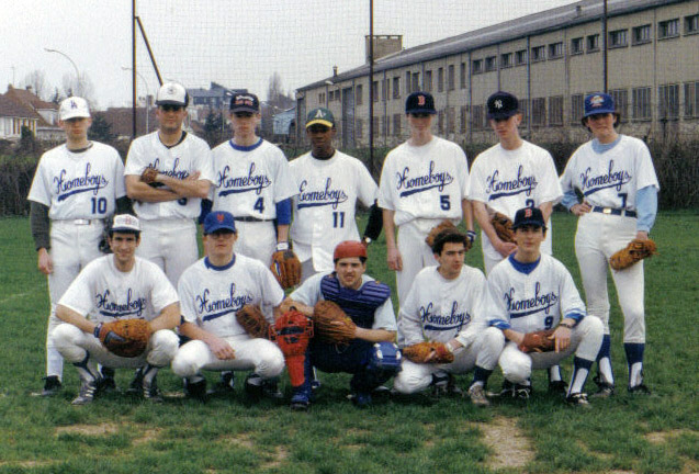 Equipe de baseball de Compiègne en 1991